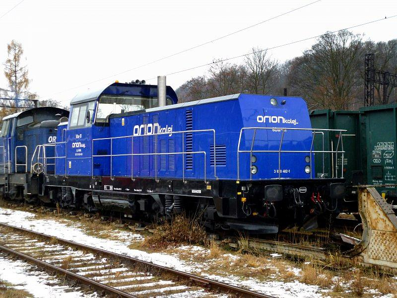 Zmodernizowany spalinowóz 6Dm-01 należący do przedsiębiorstwa Orion Kolej stoi na stacji Kłodzko Główne.